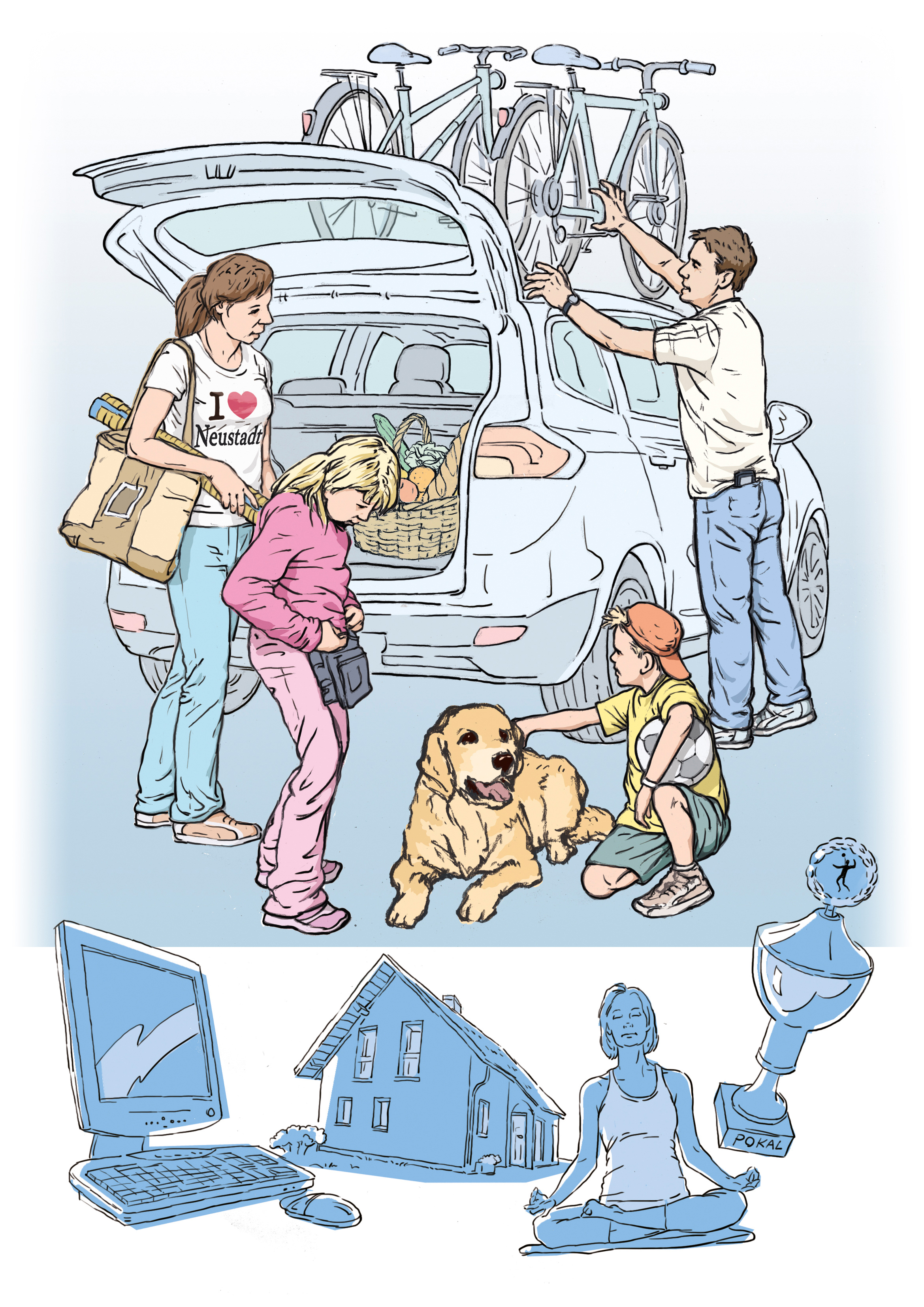 Grafische Darstellung des Typus "Familienorientierte" aus der ARD/ZDF-MedienNutzerTypologie. Beispielhafte Aussage: "Das schaffen wir schon."